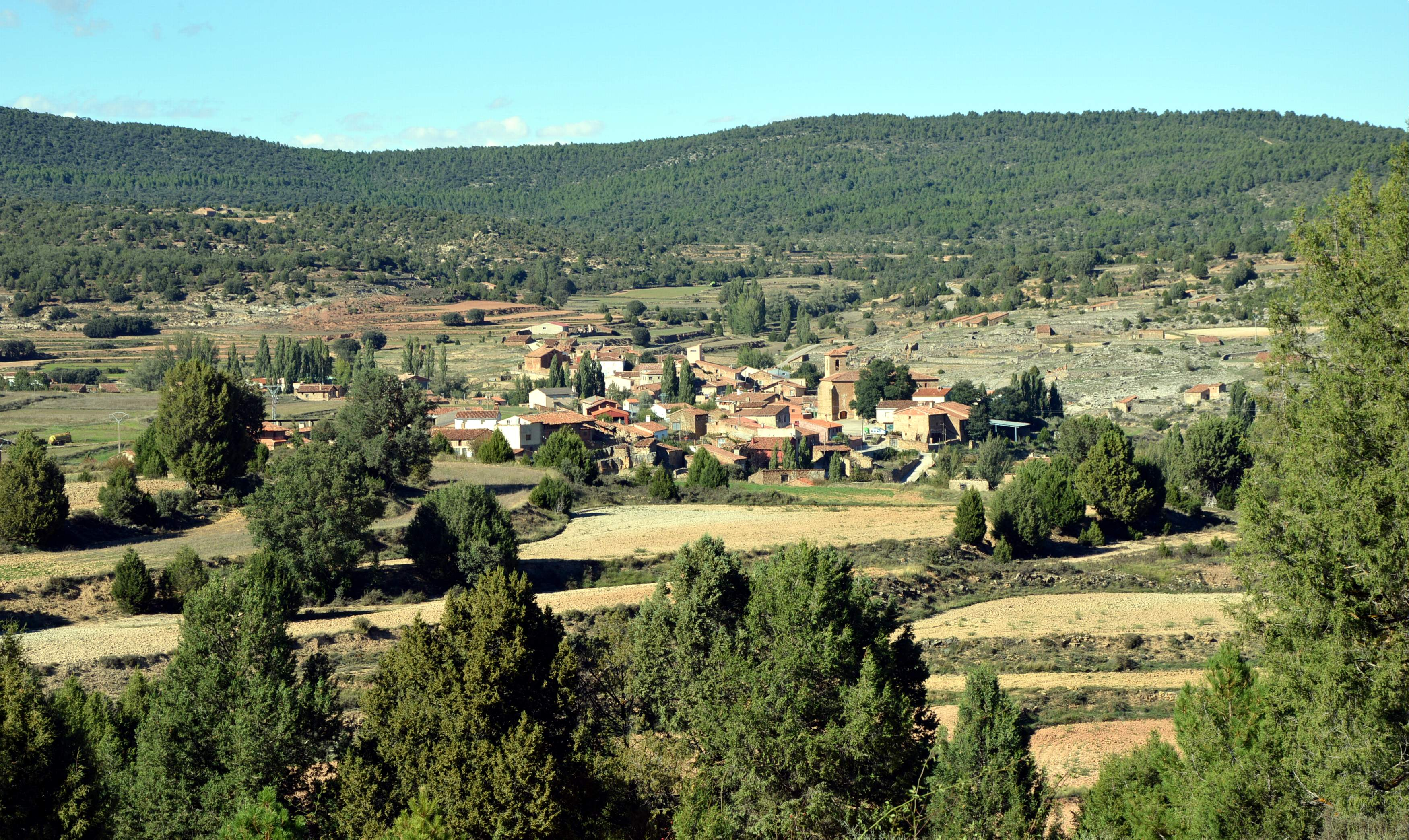 Vista general (meridional) de Alobras (Teruel), año 2015.